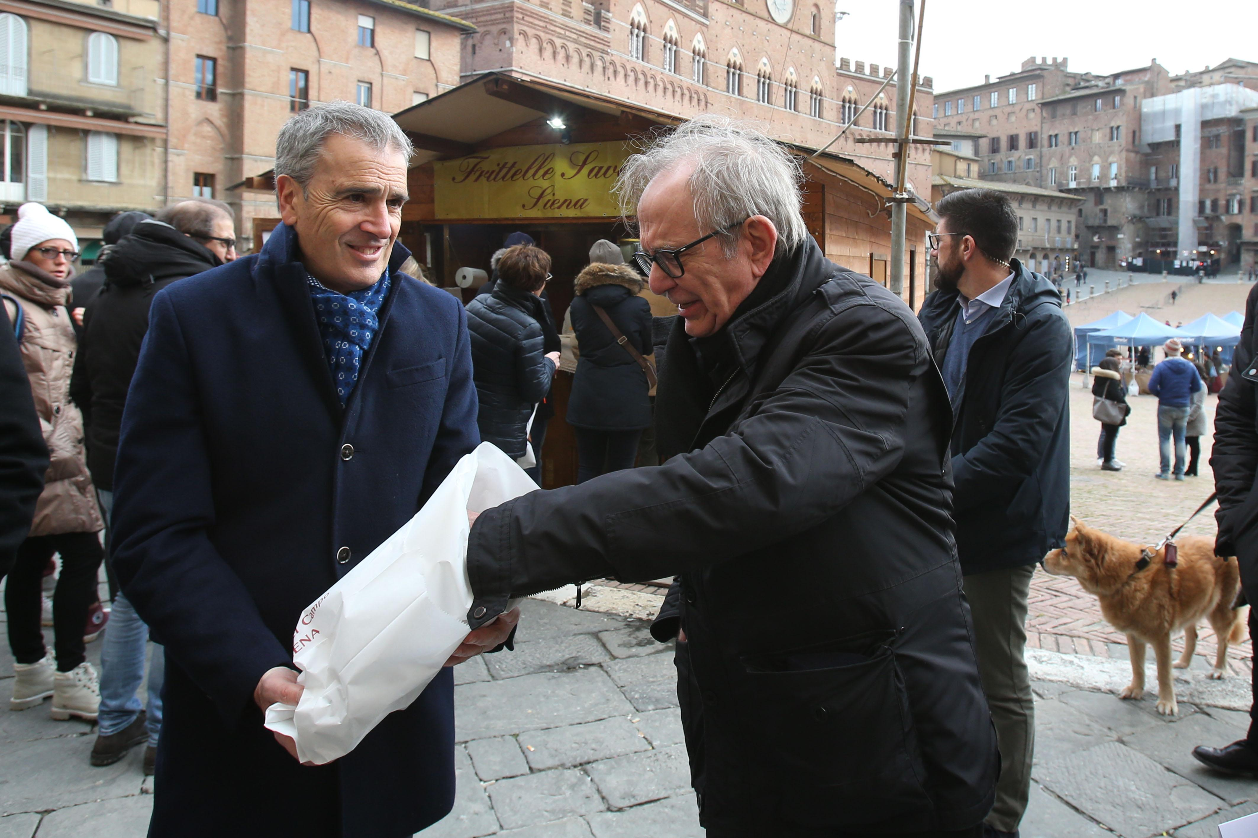 La cronaca fotografica di Pier Carlo Padoan a Siena il 24 febbraio 2018.